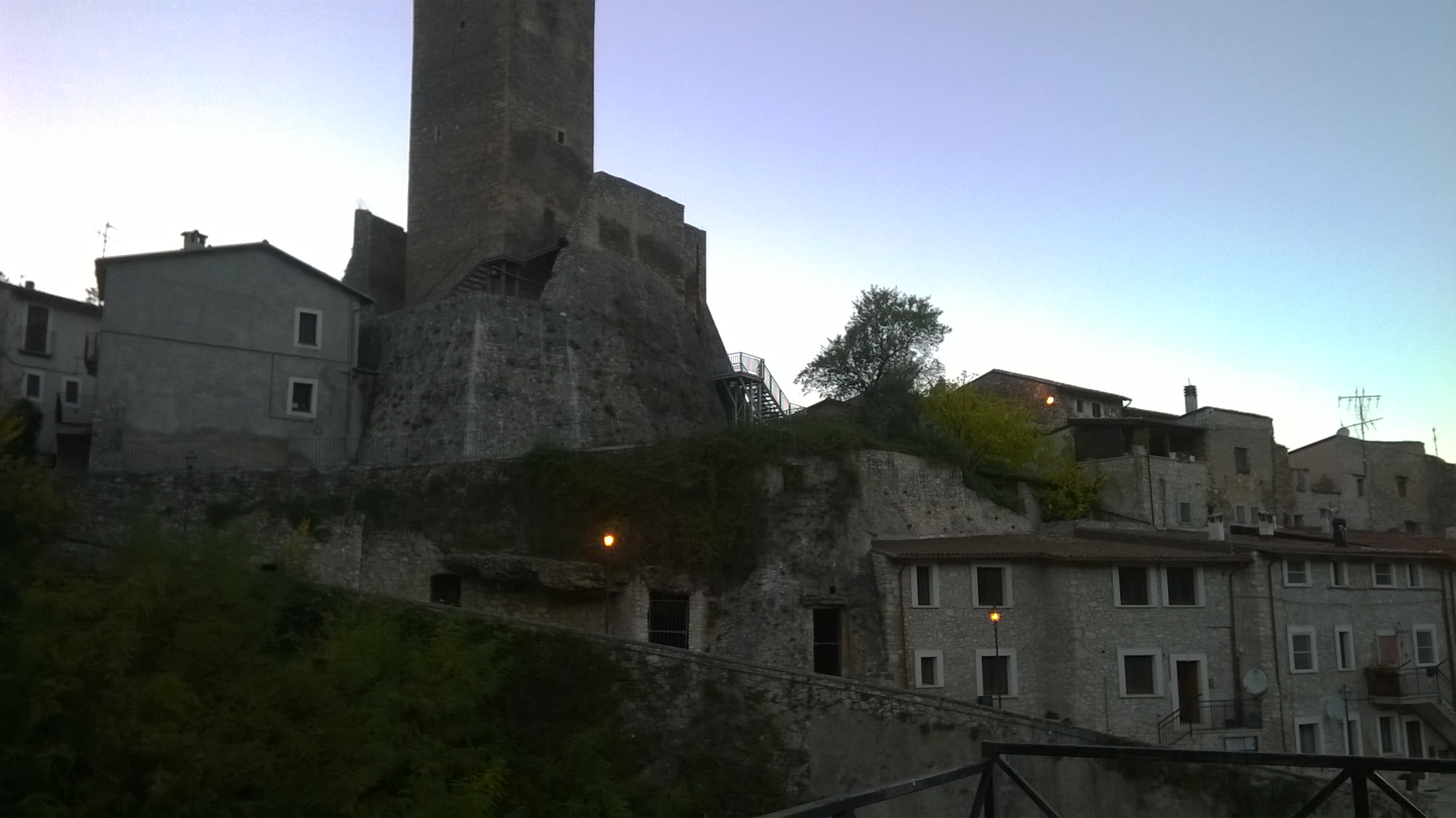 Dongione di Introdacqua, chiamato dai locali "castello", è un'antica struttura che svetta sul paese.